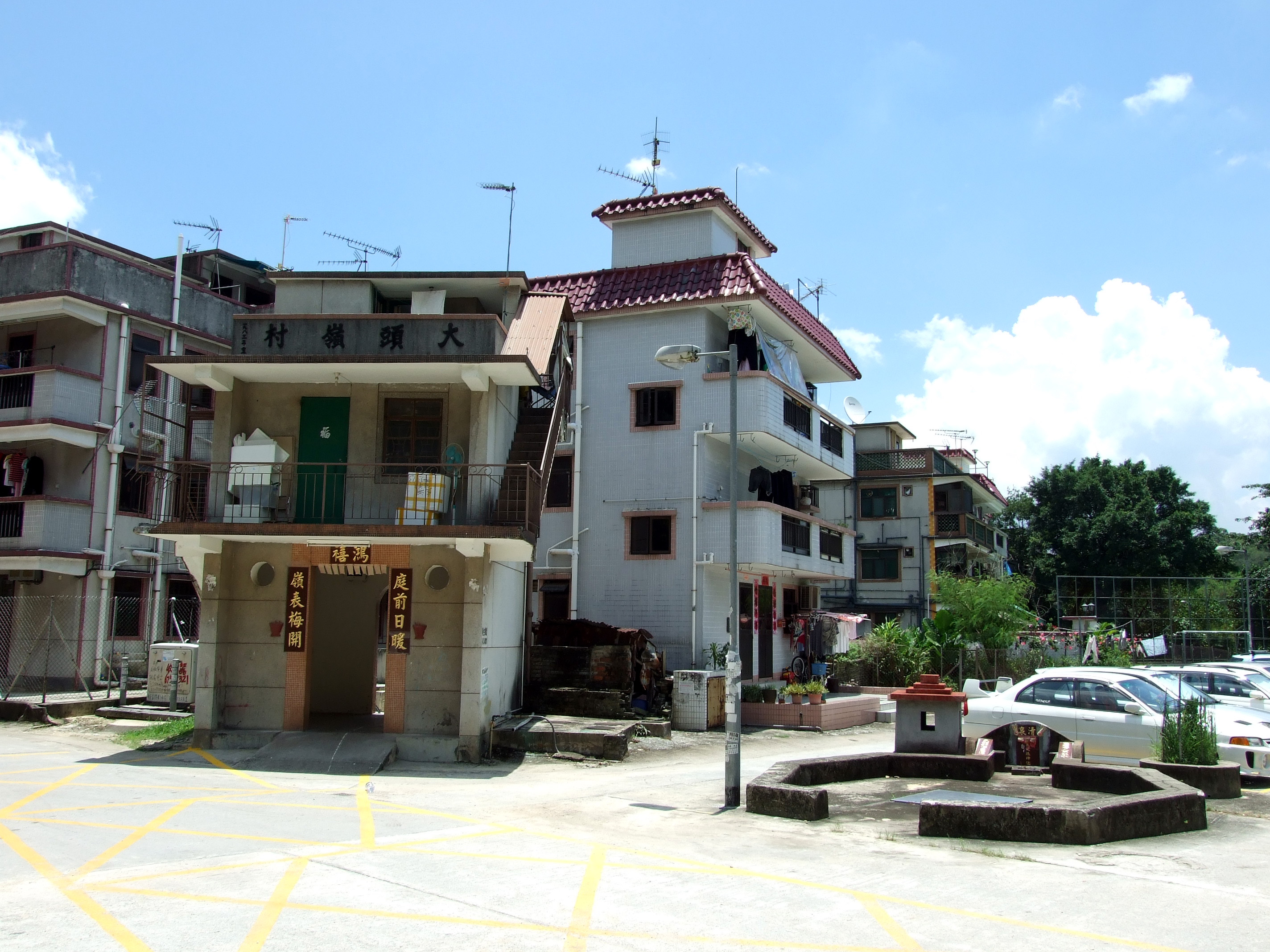 中文（香港）: 上水大頭嶺